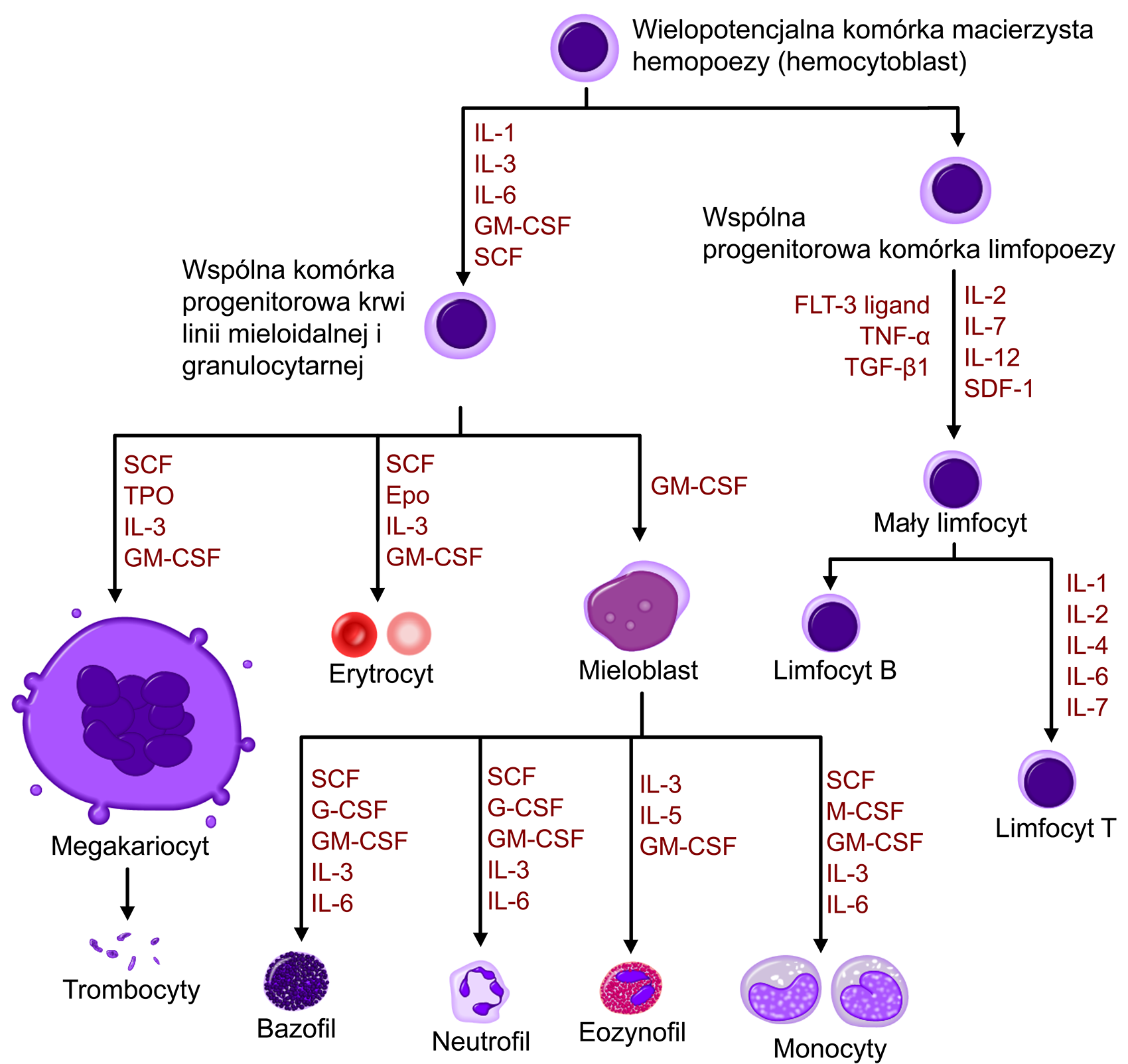 Hematopoeza u ludzi, z ważnymi hematopoetycznymi czynnikami wzrostu wpływającymi na różnicowanie. Legenda: SCF (ang. stem cell factor) – czynnik komórek macierzystych Tpo (ang. thrombopoietin) – trombopoetyna IL (ang. interleukin) – interleukina GM-CSF (ang. granulocyte macrophage-colony stimulating factor) – czynnik stymulujący tworzenie kolonii granulocytów i makrofagów Epo (ang. erythropoietin) – erytropoetyna M-CSF (ang. macrophage-colony stimulating factor) – czynnik stymulujący tworzenie kolonii makrofagów G-CSF (ang. granulocyte colony-stimulating factor) – czynnik stymulujący tworzenie kolonii granulocytów SDF-1 (ang. stromal cell-derived factor-1) – czynnik wzrostowy w szpiku kostnym dla prekursorów limfocytów FLT-3 (ang. FMS-like tyrosine kinase 3 ligand) – ligand FMS-podobnej kinazy tyrozynowej 3 TNF-a (ang. tumor necrosis factor-alpha) – czynnik martwicy nowotworów TGF-β (ang. Transforming growth factor beta) – transformujący czynnik wzrostu beta